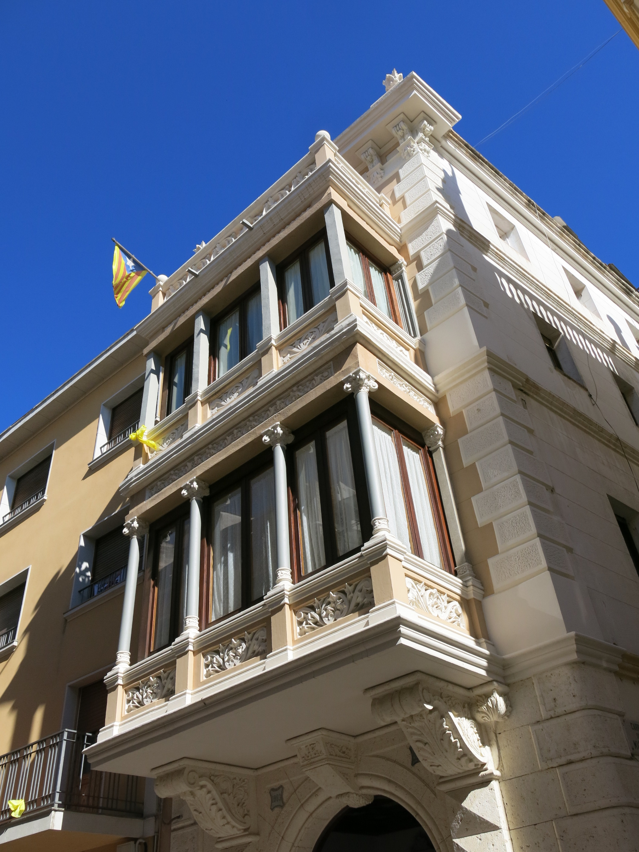 Ca l'Escarrà (l'Arboç)